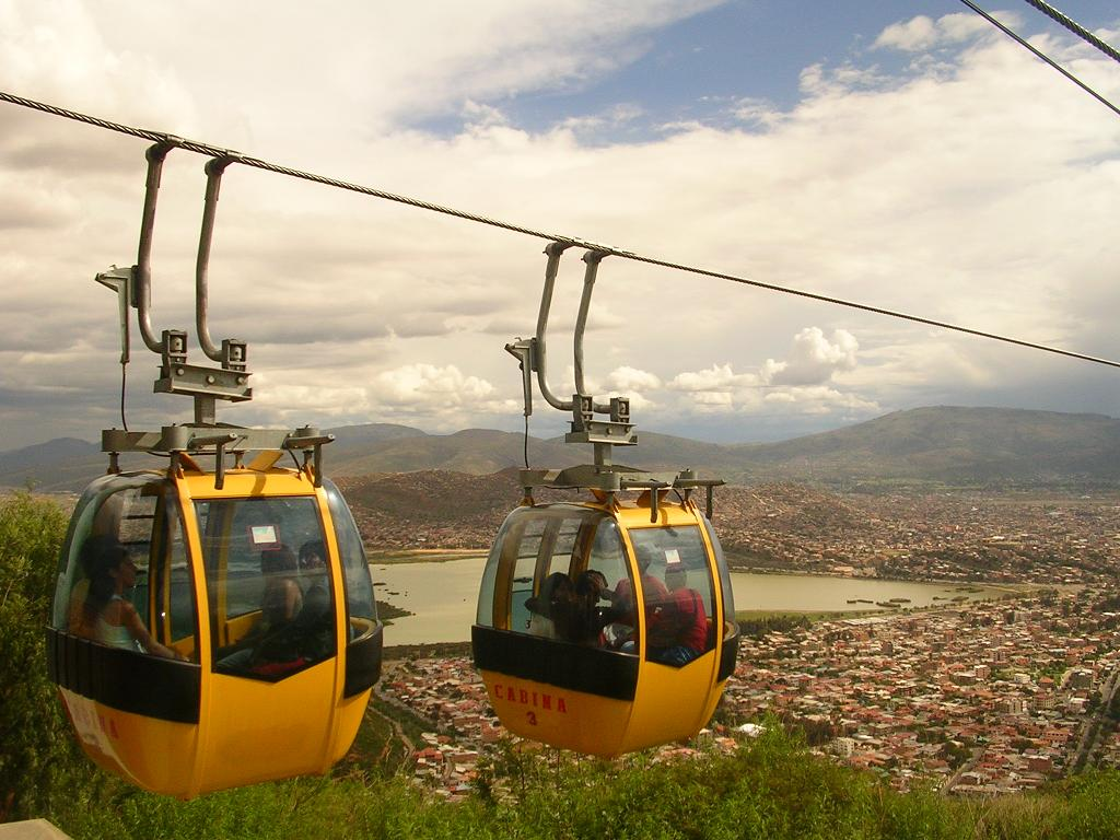 Vista de Cochabamba y su teleférico desde la base del Cristo de la concordia.